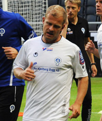 Kristian Bergström